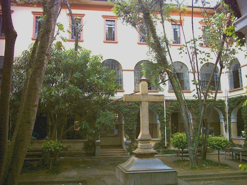 O Pátio da Cruz, na PUC-SP. Fotografia tirada por Fábio Soldá Barbosa Araujo, em 14 de novembro de 2006.